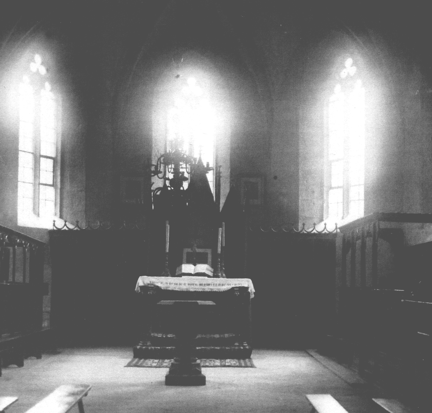 Evangelische Kirche St. Laurentius in Dassel, Niedersachsen, Deutschland – Altarraum 1908